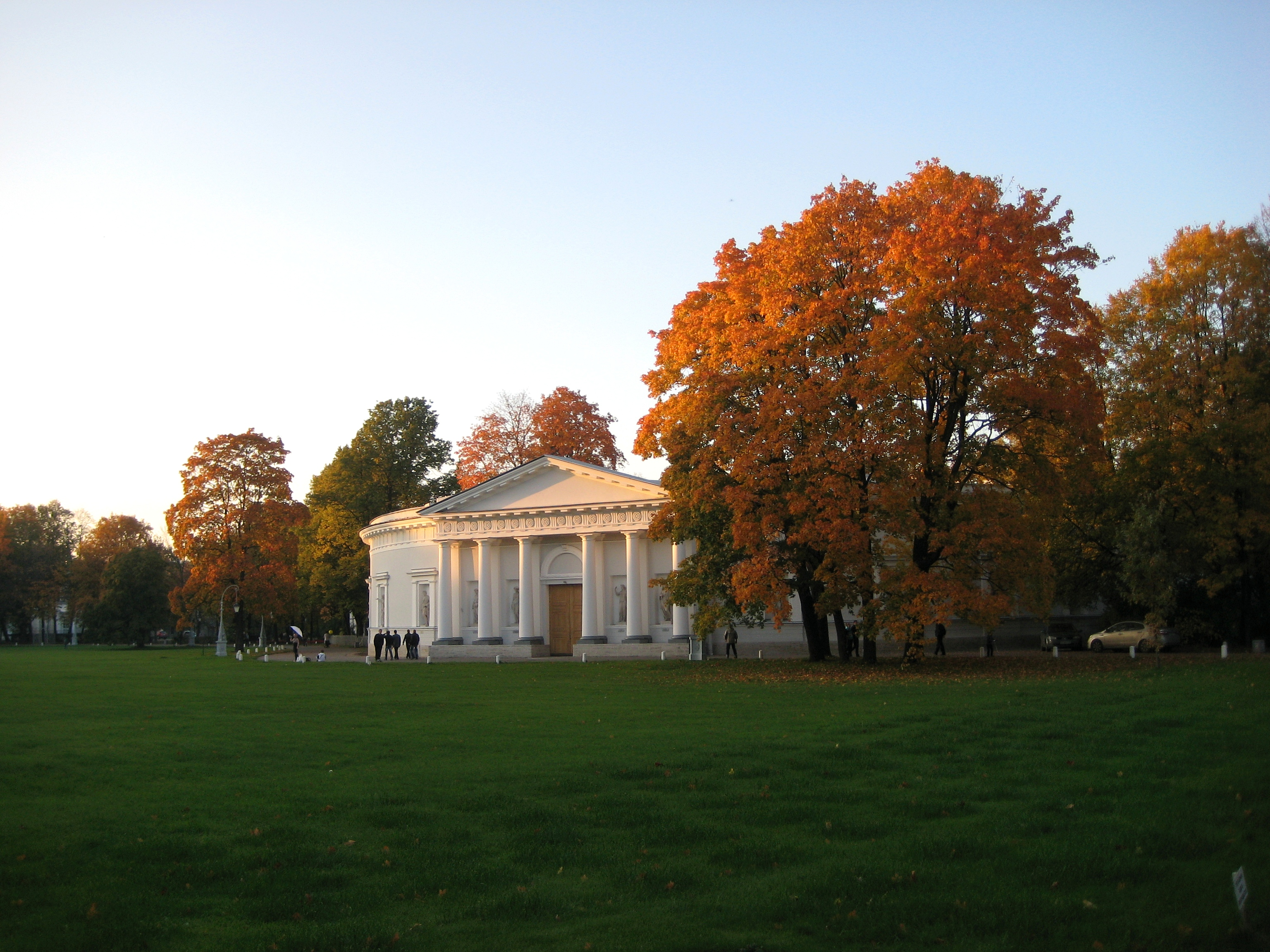 Санкт-Петербург. Дворцово-парковый комплекс на острове Елагин. Кухонный корпус. арх. К.Росси. Поздняя осень.